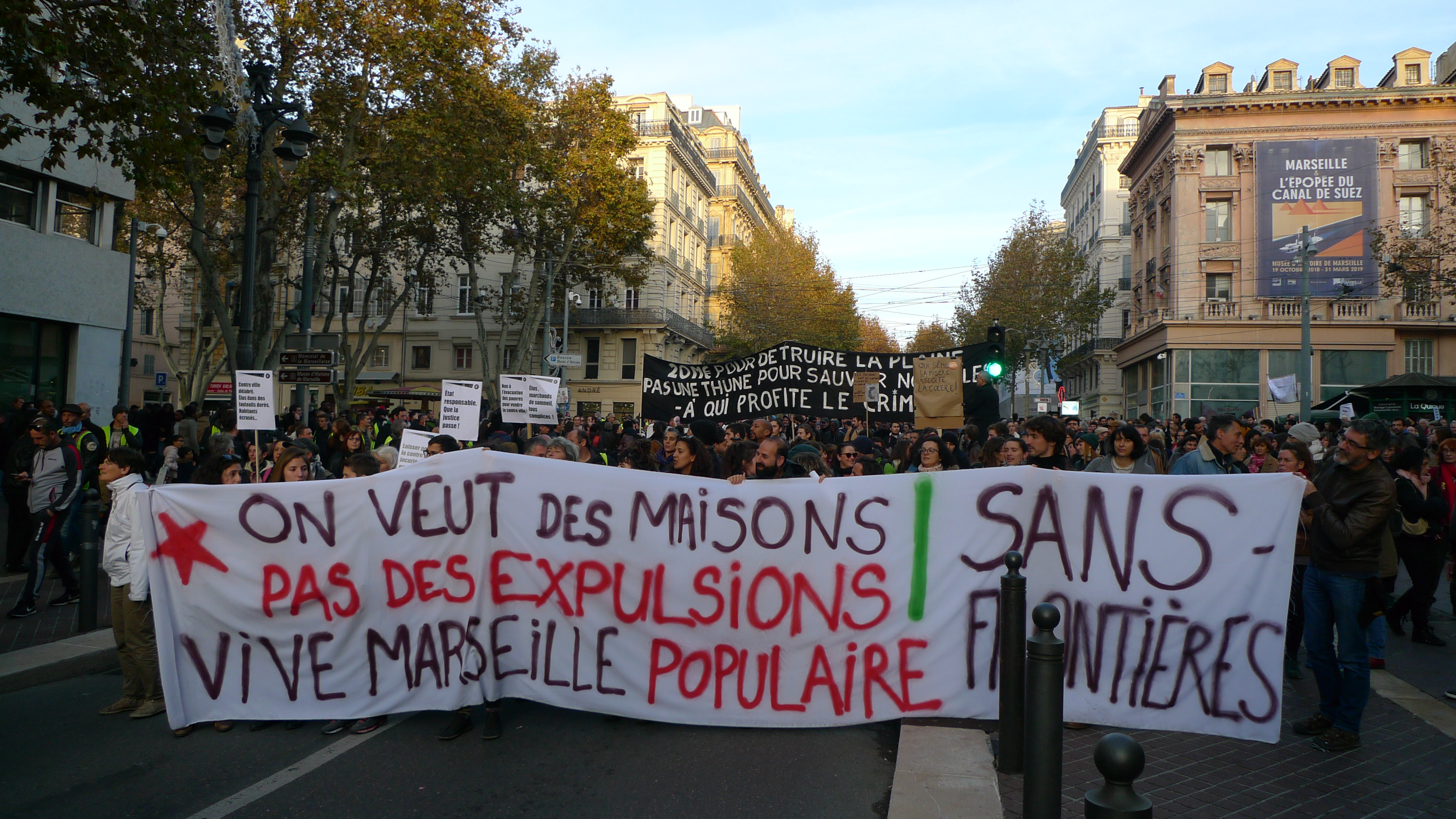 Manifestation suite aux effondrements des immeubles de la rue d'Aubagne, à Marseille, le 1er décembre 2018